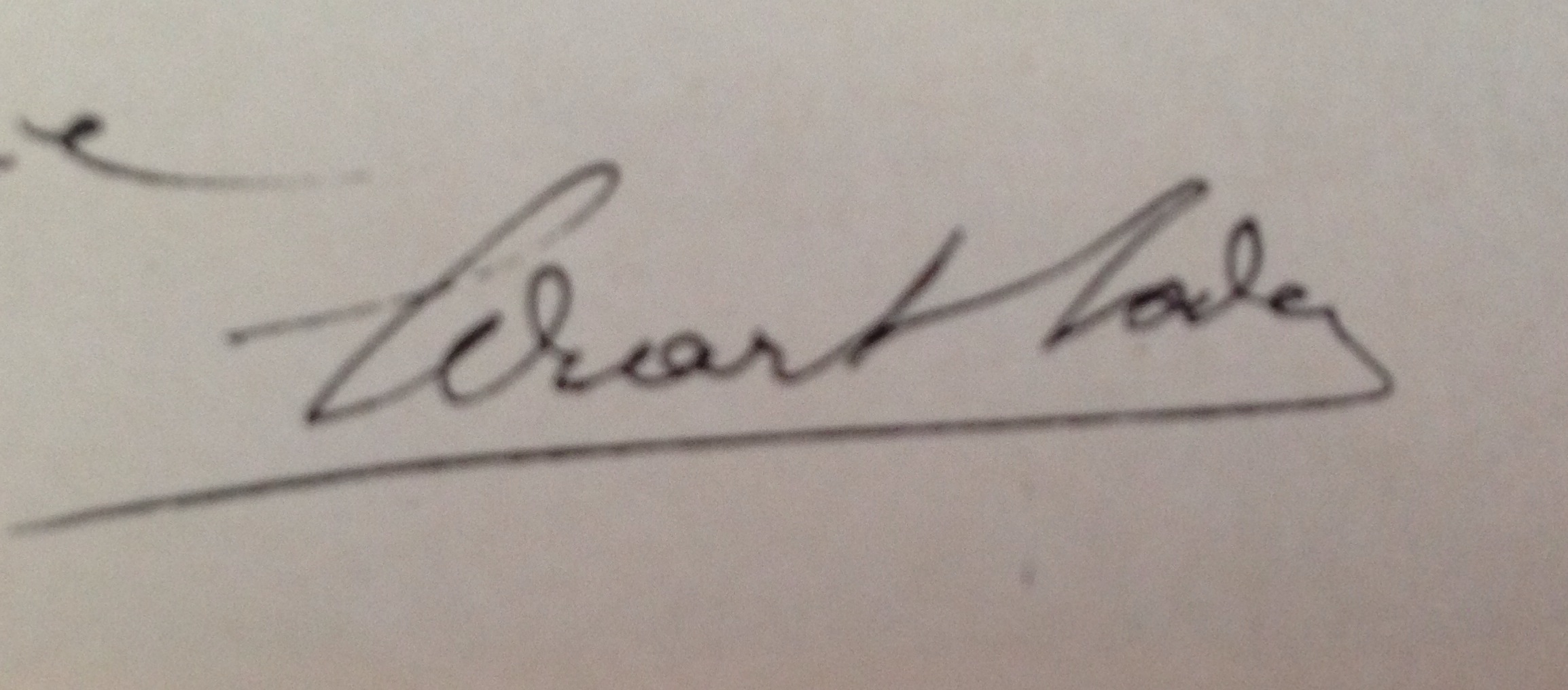 Signatura d'Eduard Toda en una carta adreçada a Eufemià Fort i Cogul.